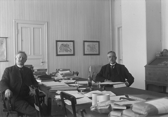 To revisorer ved A/S Sulitjelma AB. Gruber. Det er usikkert om de var fra Bodø. 1920 - 1930 NM.F.008621-00056